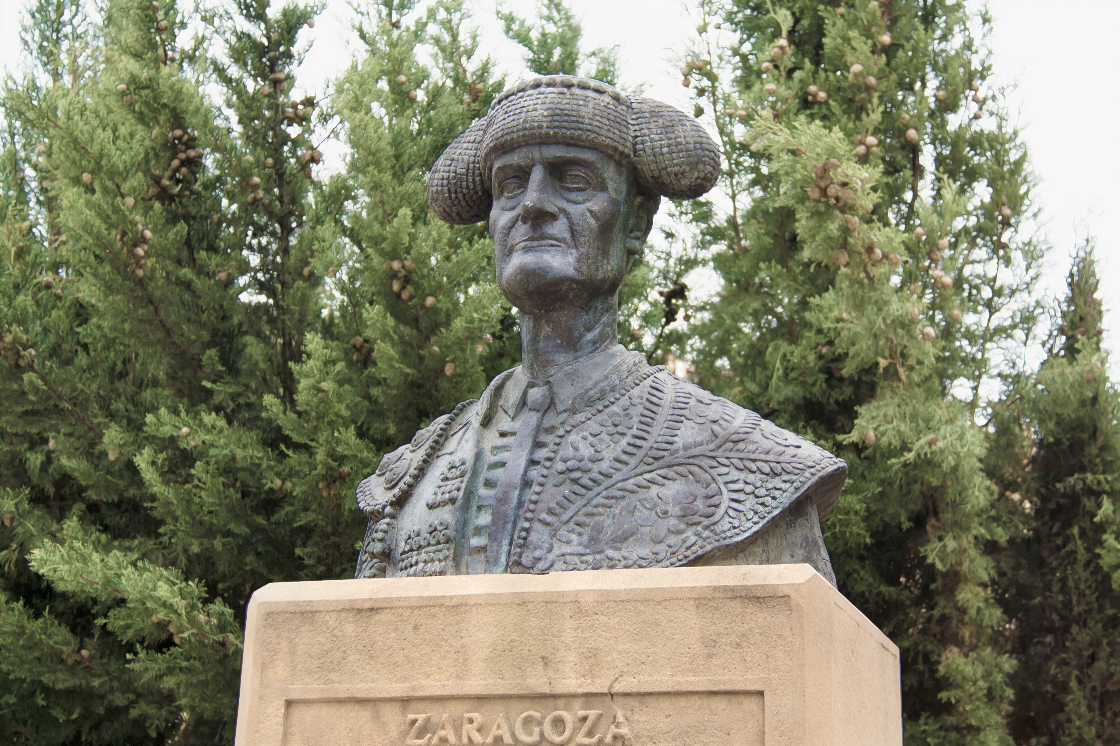 Zaragoza, España